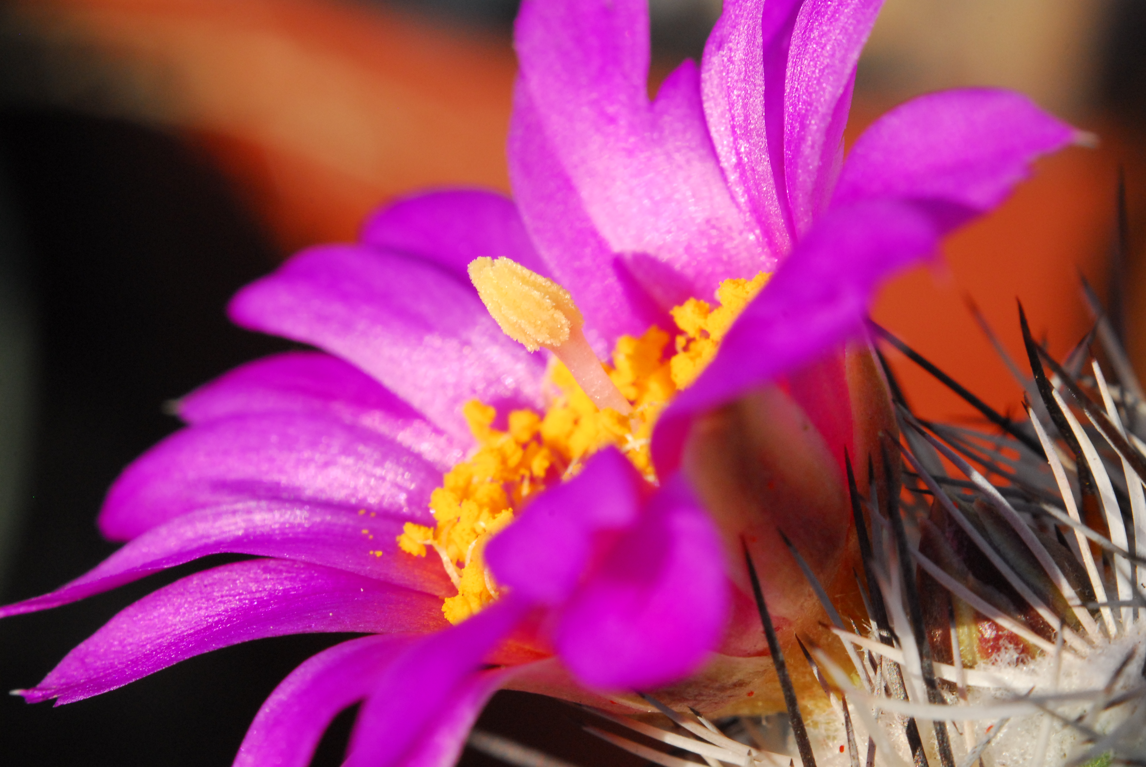 Blüte von Neolloydia conoidea in Kultur. Flor de Neolloydia conoidea en cultivo. Flower of Neolloydia conoidea in cultivation.